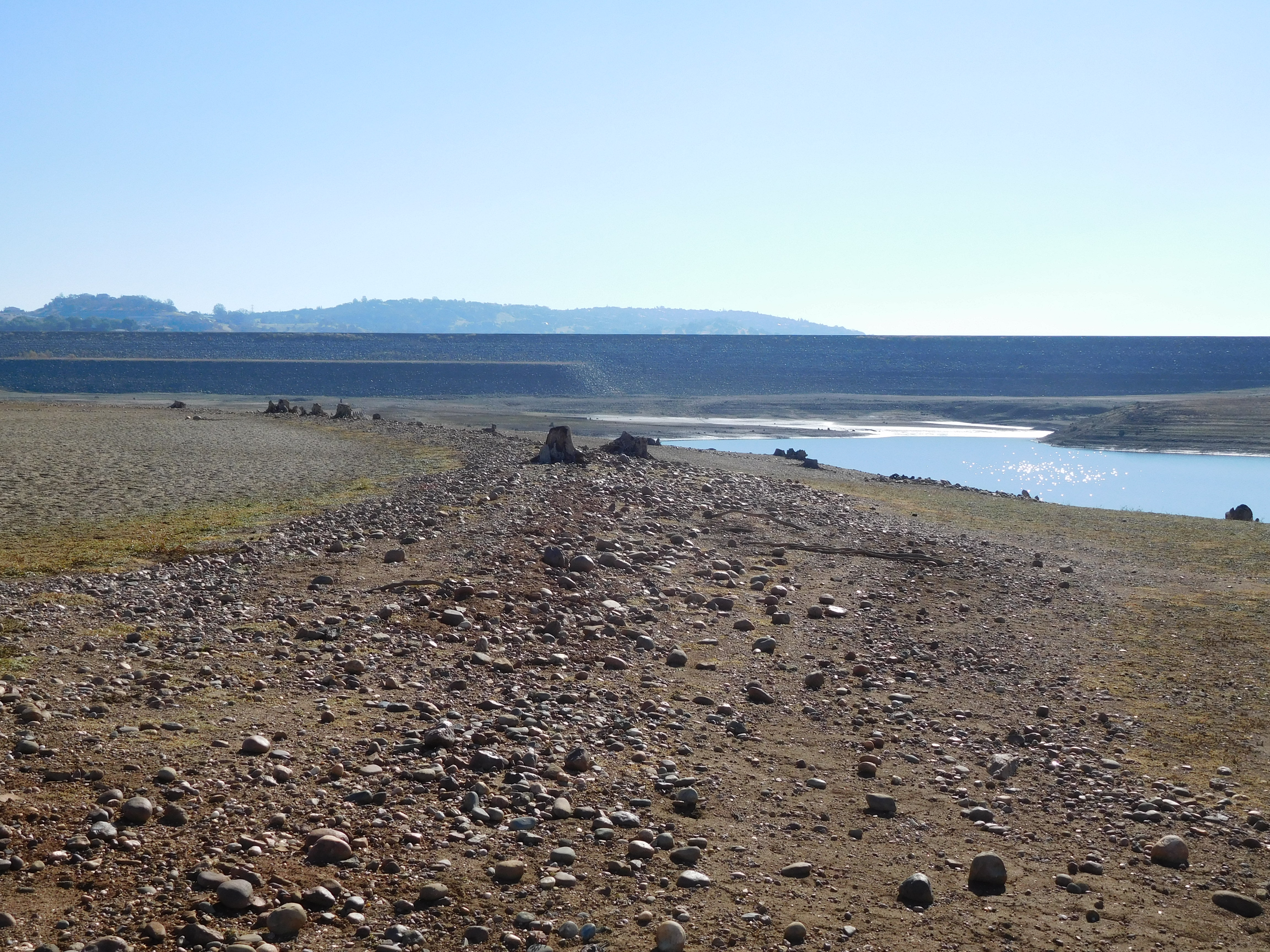 Folsom Lake 77